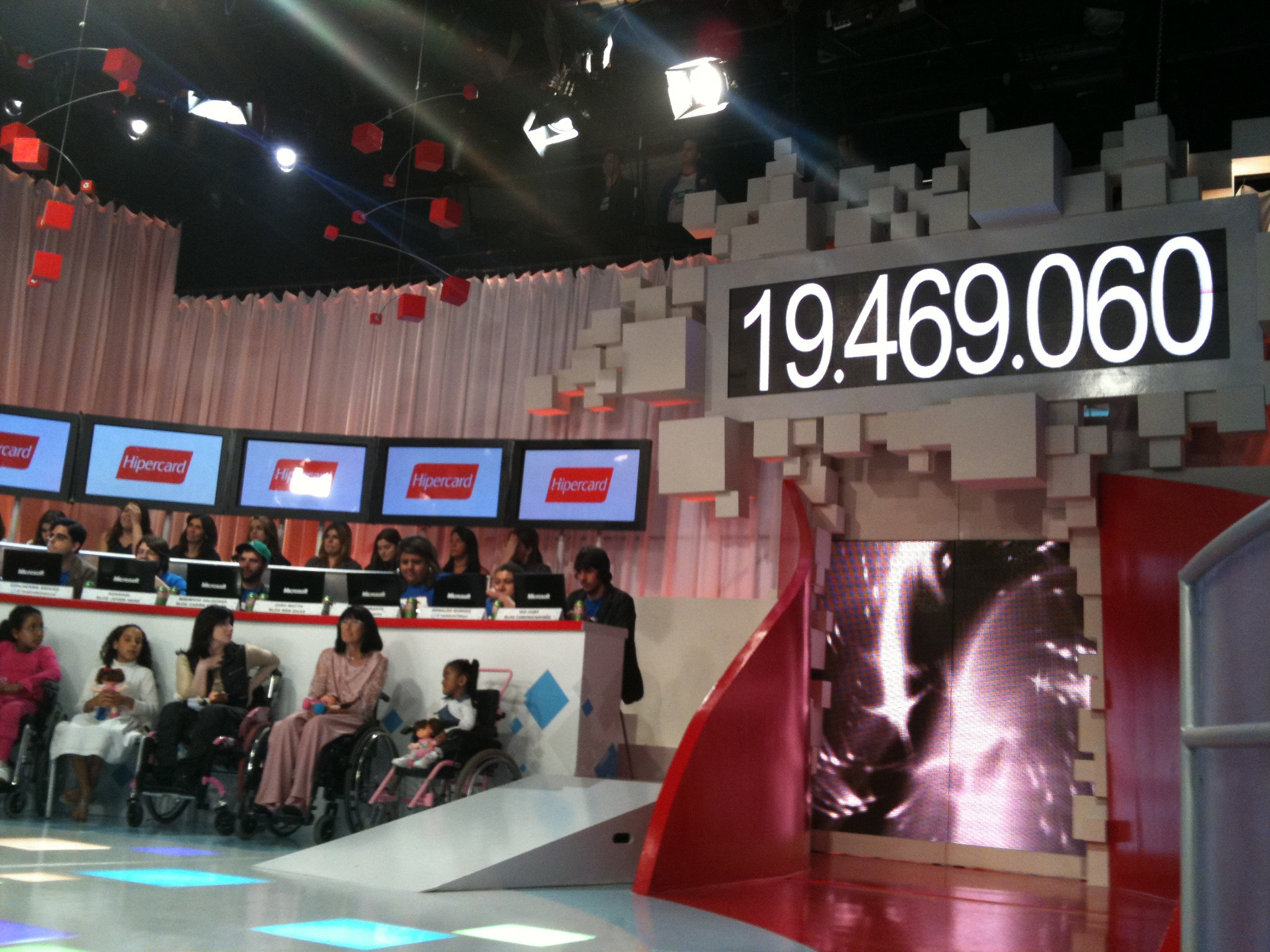 Teleton 2010